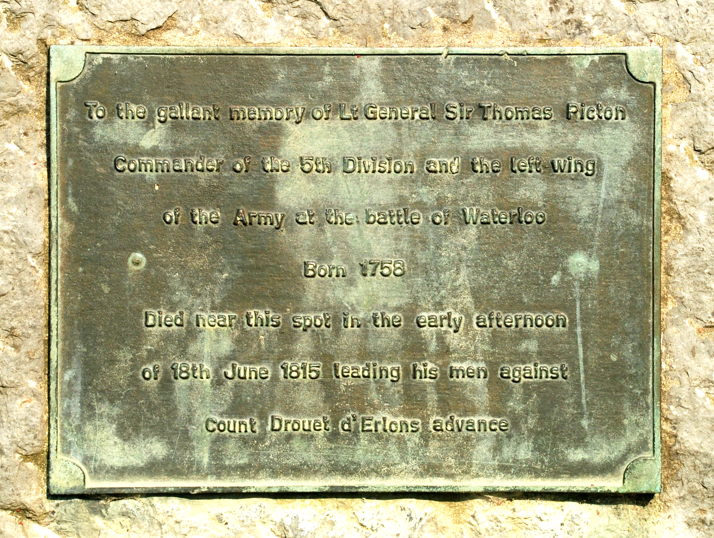 Belgique - Brabant wallon - Lasne - Plancenoit - Stèle Picton